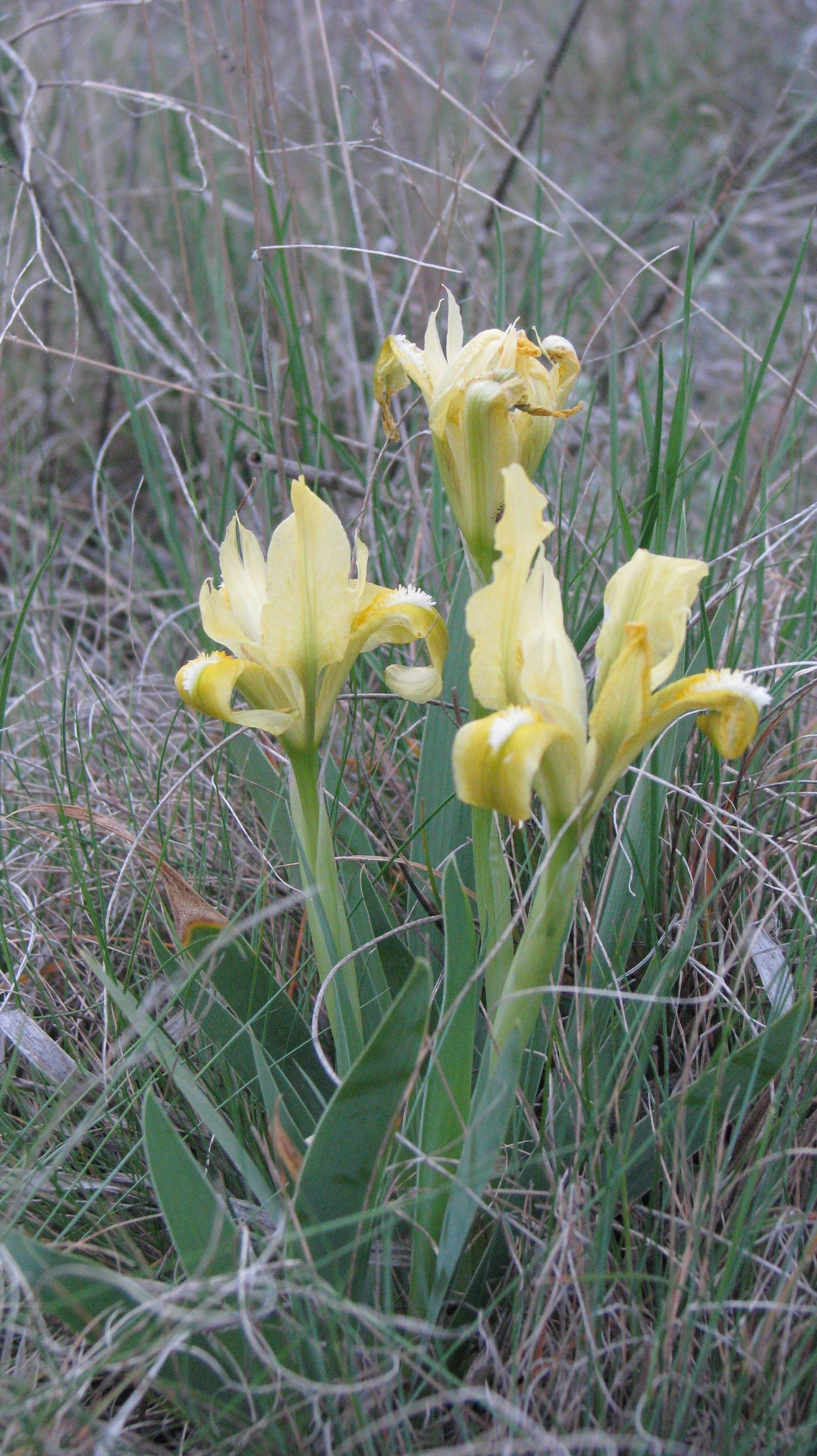 Касатик низкий (Iris pumila L.)